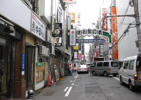 大阪 宗右衛門町